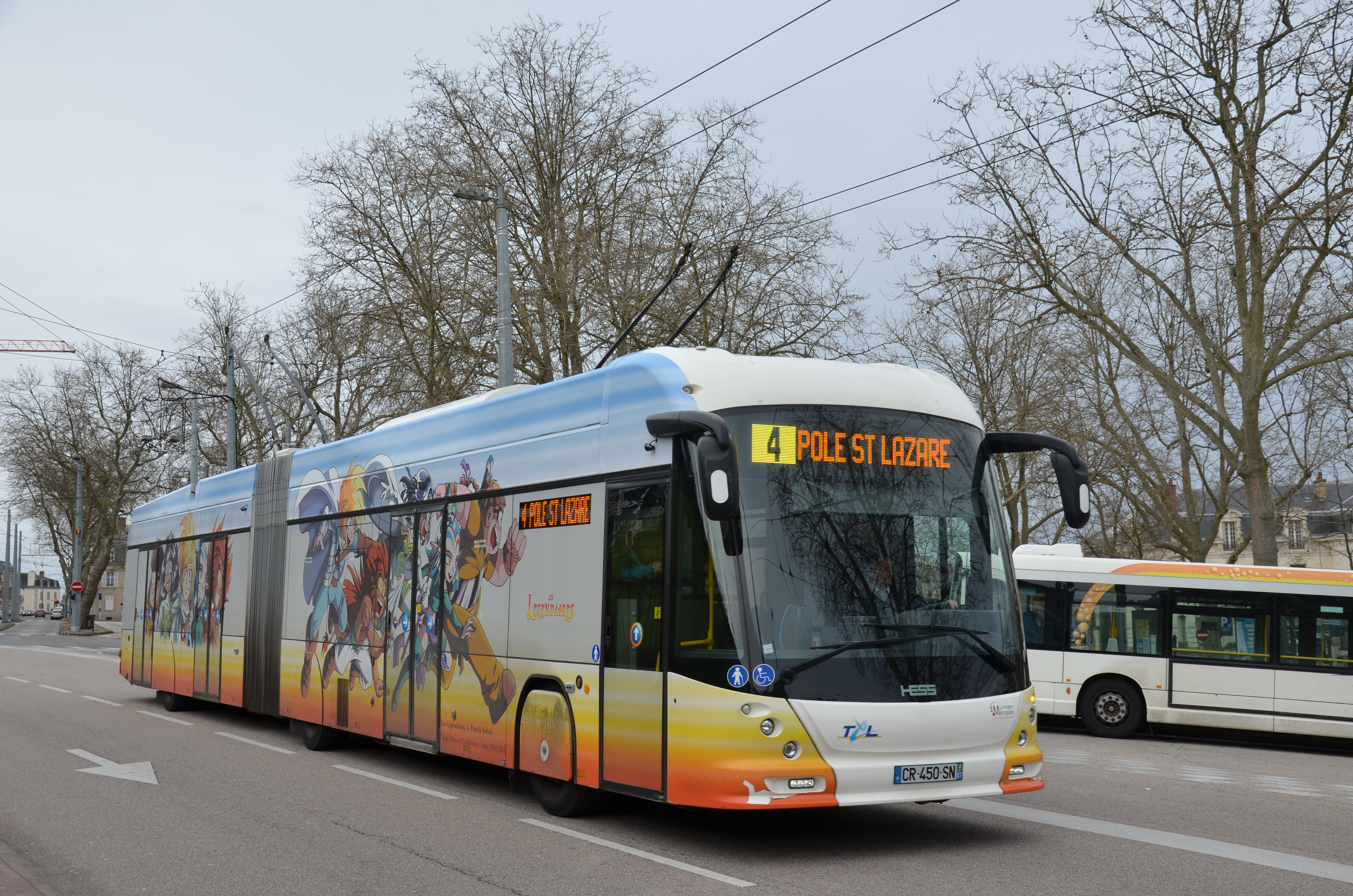 Hess Swisstrolley 4 n°904 sur la ligne 4 du réseau TCL de Limoges, près de l'arrêt Place Winston Churchill.